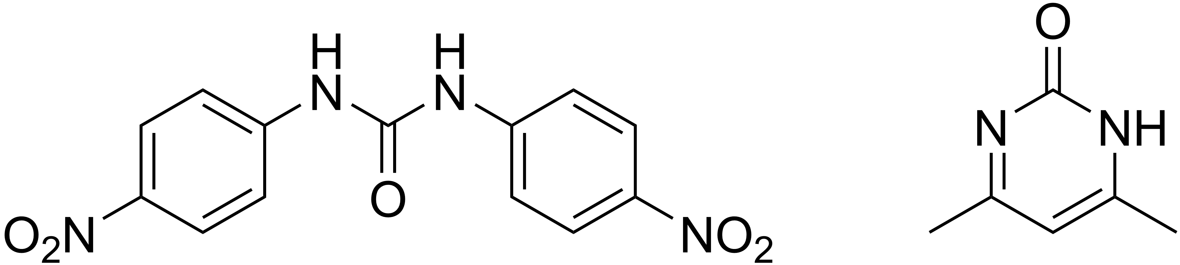 chemical structure of Nicarbazin